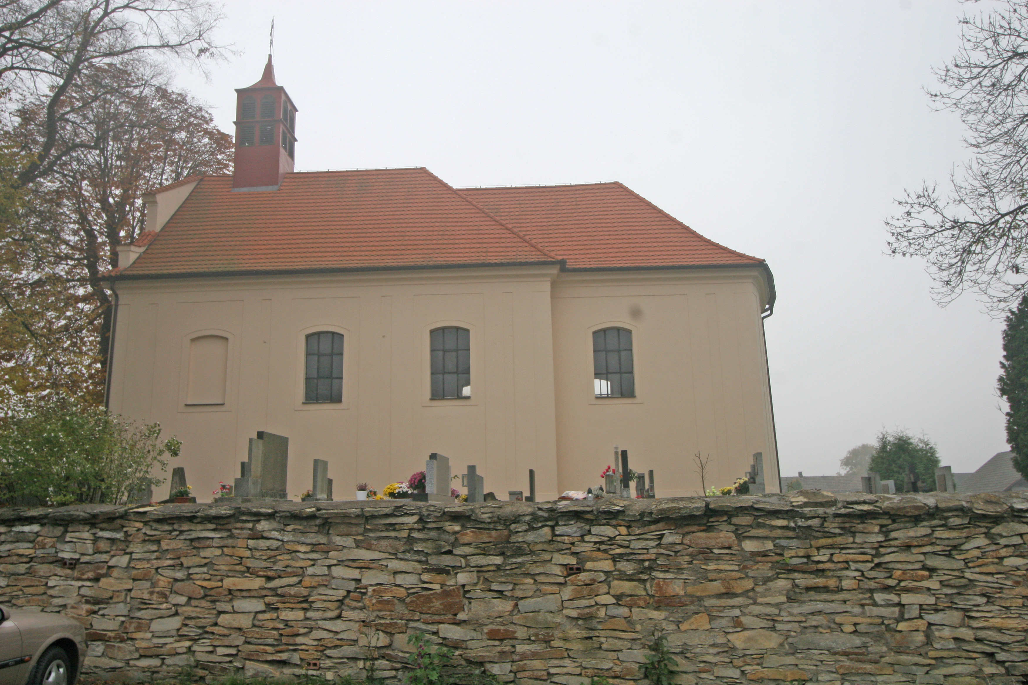 Kostel Nanebevzetí Panny Marie (Krňovice), Krňovice